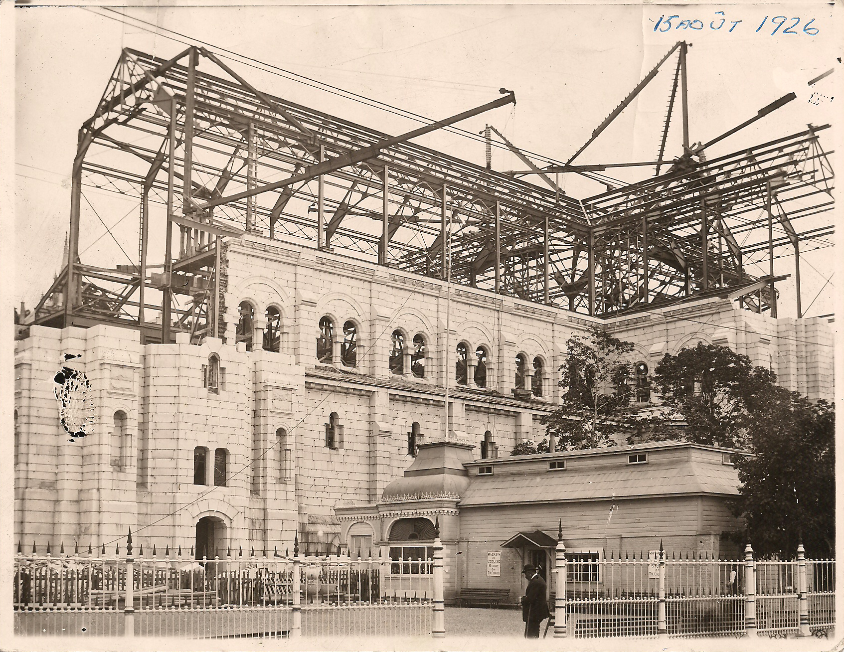 Saint Anne de Beaupré